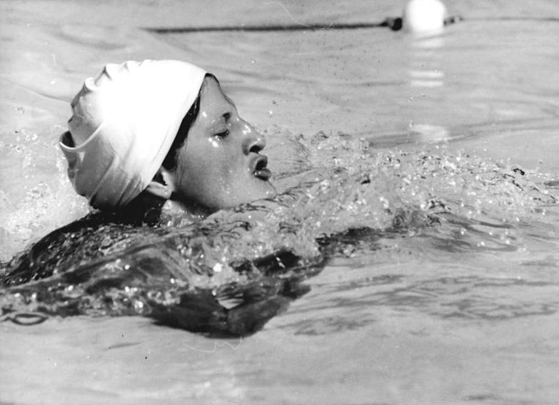 Hannelore Anke ADN-ZB Mittelstädt str-26.7.75-Cali-Kolumbien: II.Schwimm-Weltmeisterschaften-Ihren zweiten Titel errang Hannelore Anke (DDR) über 200 m Brust in 2:37,25 min. In diesem Rennen muß sich Hannelore gegen die in Cali stark verbesserte Holländerin Wijda Mazereeuw zur Wehr setzen, die mit 0,25 s Rückstand Zweite wurde.